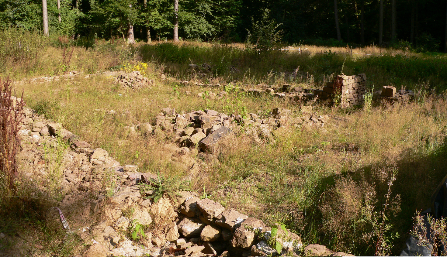 Wüstung Schmeessen mit Grundmauern der Kirche